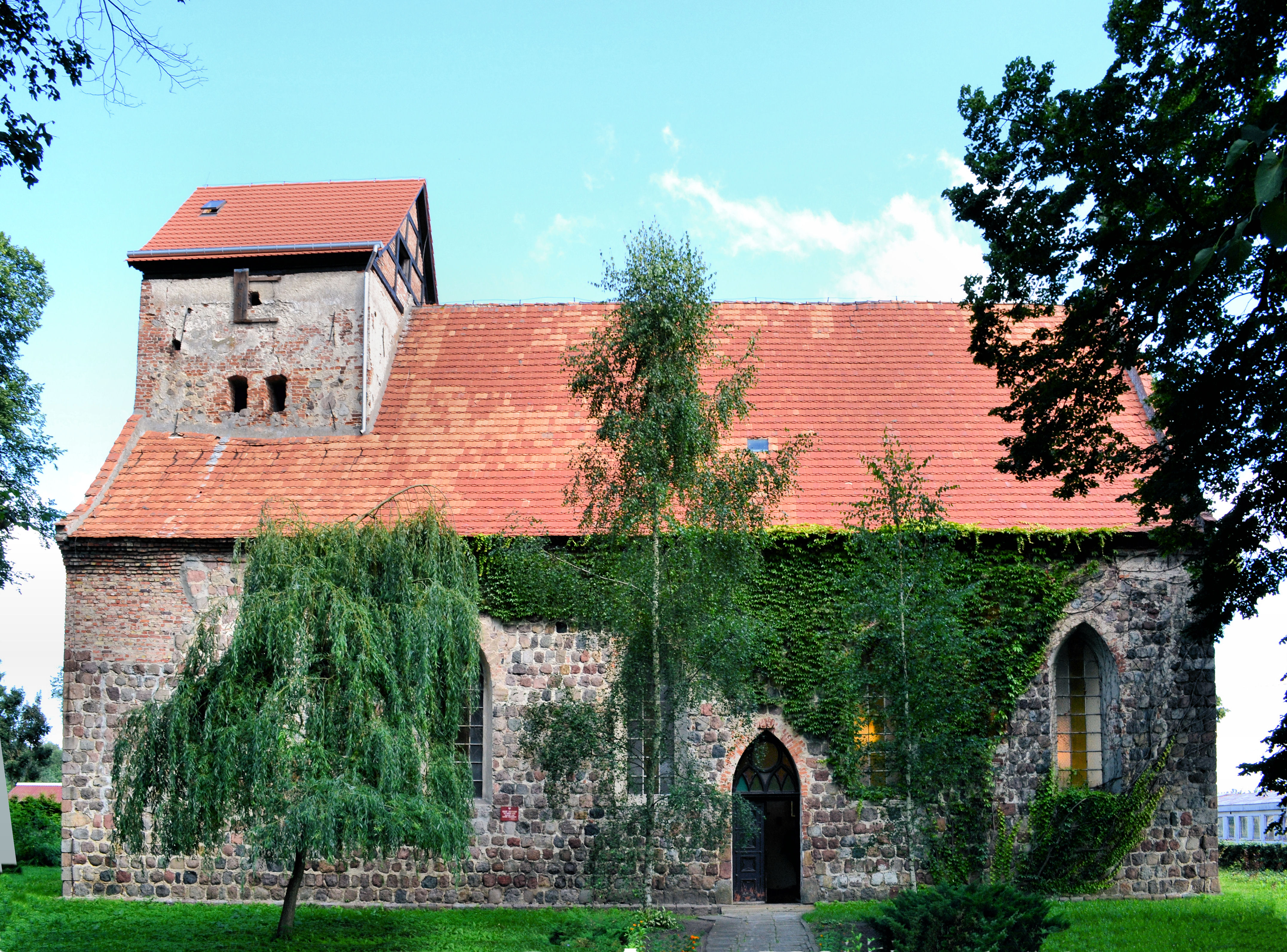 Kościół św. Antoniego Padewskiego w Buku (powiat policki)